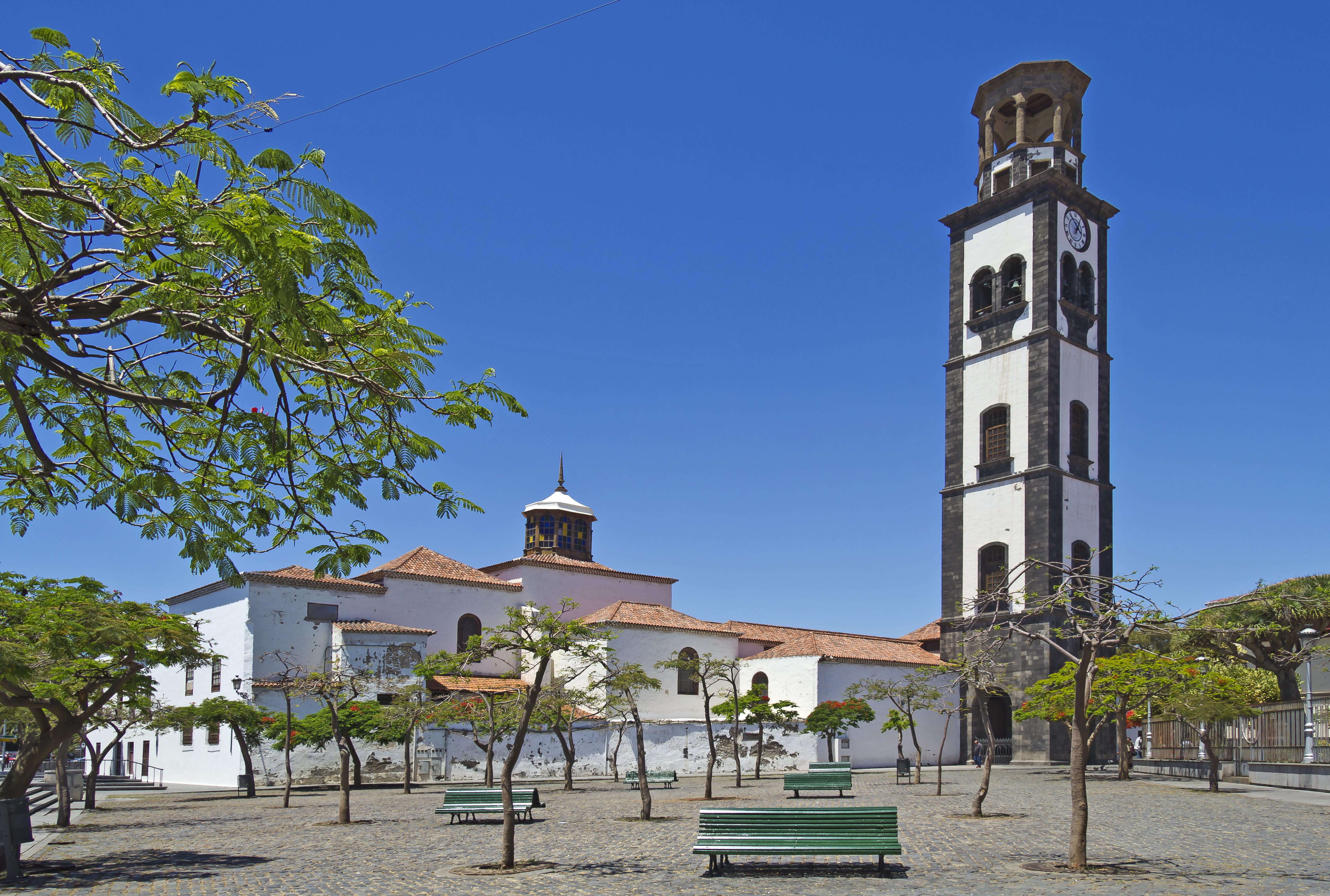 Kirchplatz nörtlich der Kirche Nuestra Señora de la Concepción in Santa Cruz de Tenerife